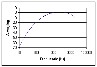 A-weging als functie van frequentie van geluid. Eigen werk, ter beschikking gesteld onder de GFDL licentie door Gebruiker:Ellywa